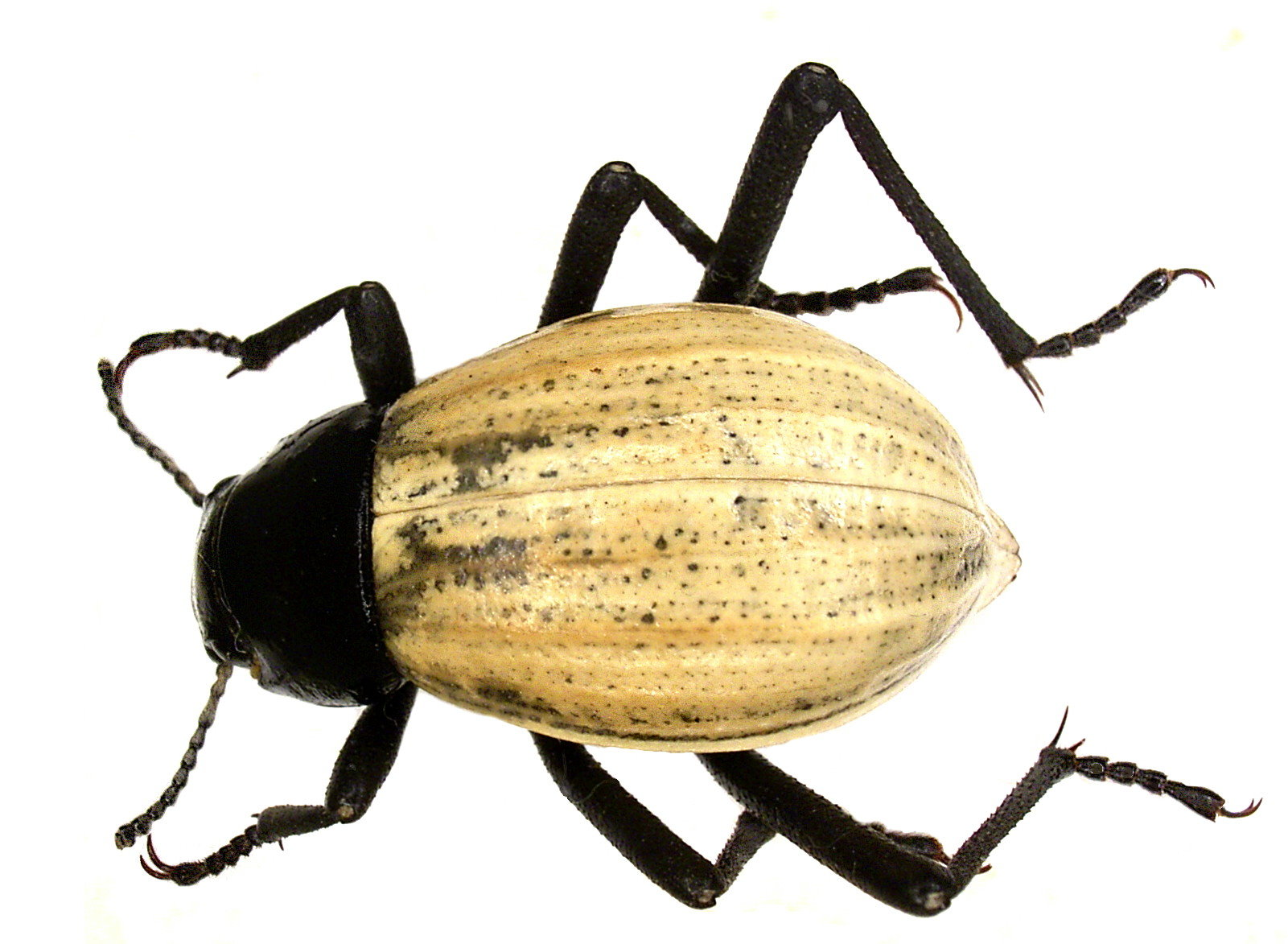 Familie: Tenebrionidae Grösse: 12-18 mm Fundort: Namibia, Swakopmund leg. U.Schmidt, 1994; det. M.Lillig Foto: U.Schmidt, 2005